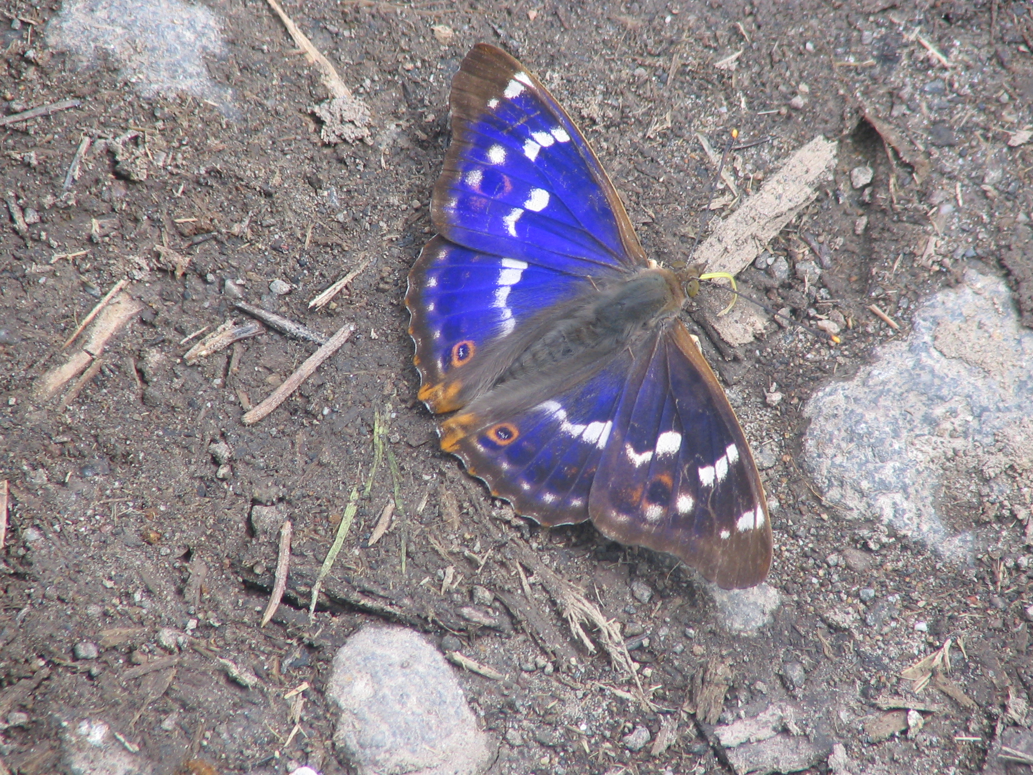 Fluture fotografiat in iulie 2005. Apatura ilia, fluturele cu irizati.